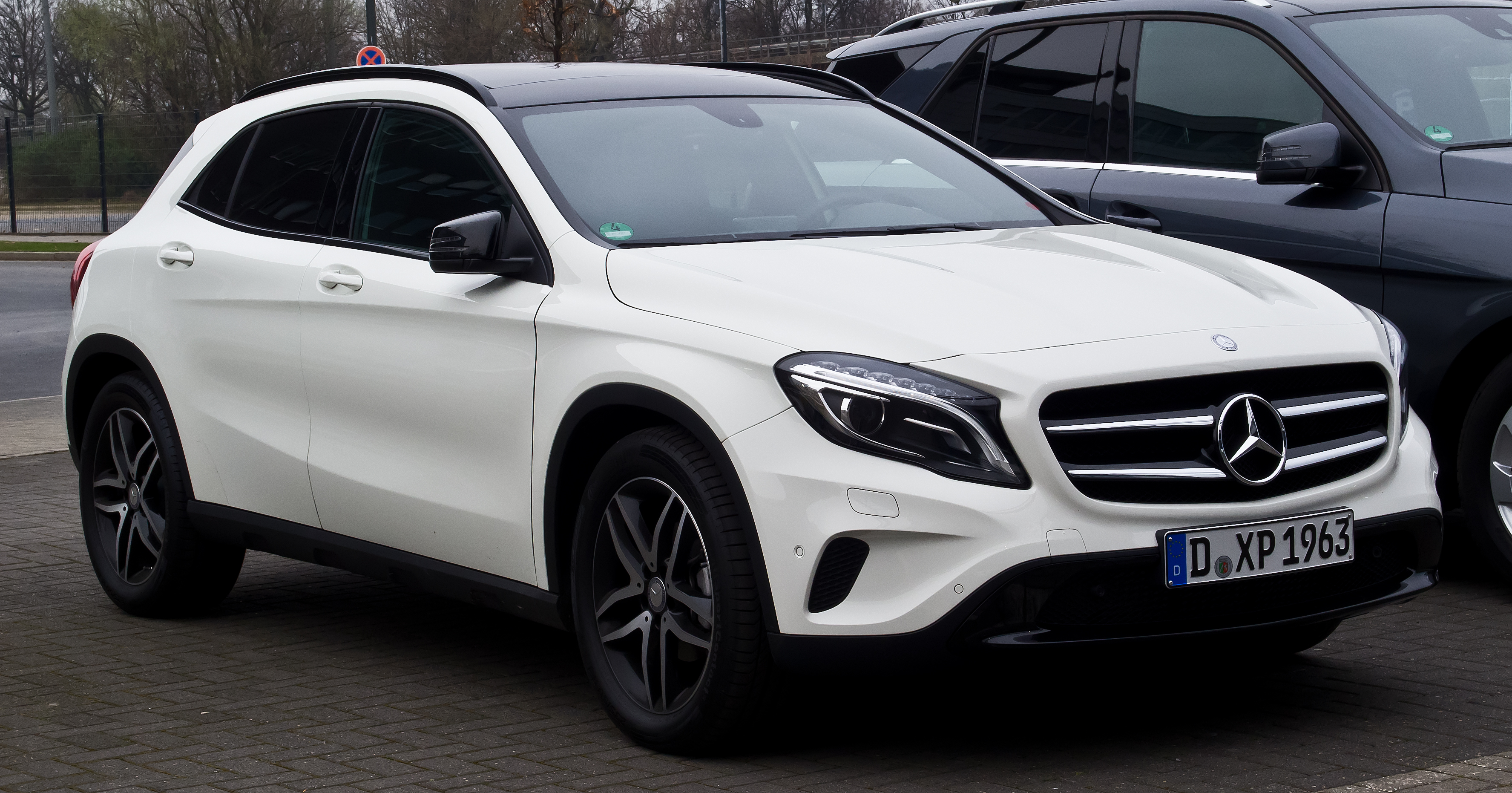 Mercedes-Benz GLA 200 CDI Urban (X 156)